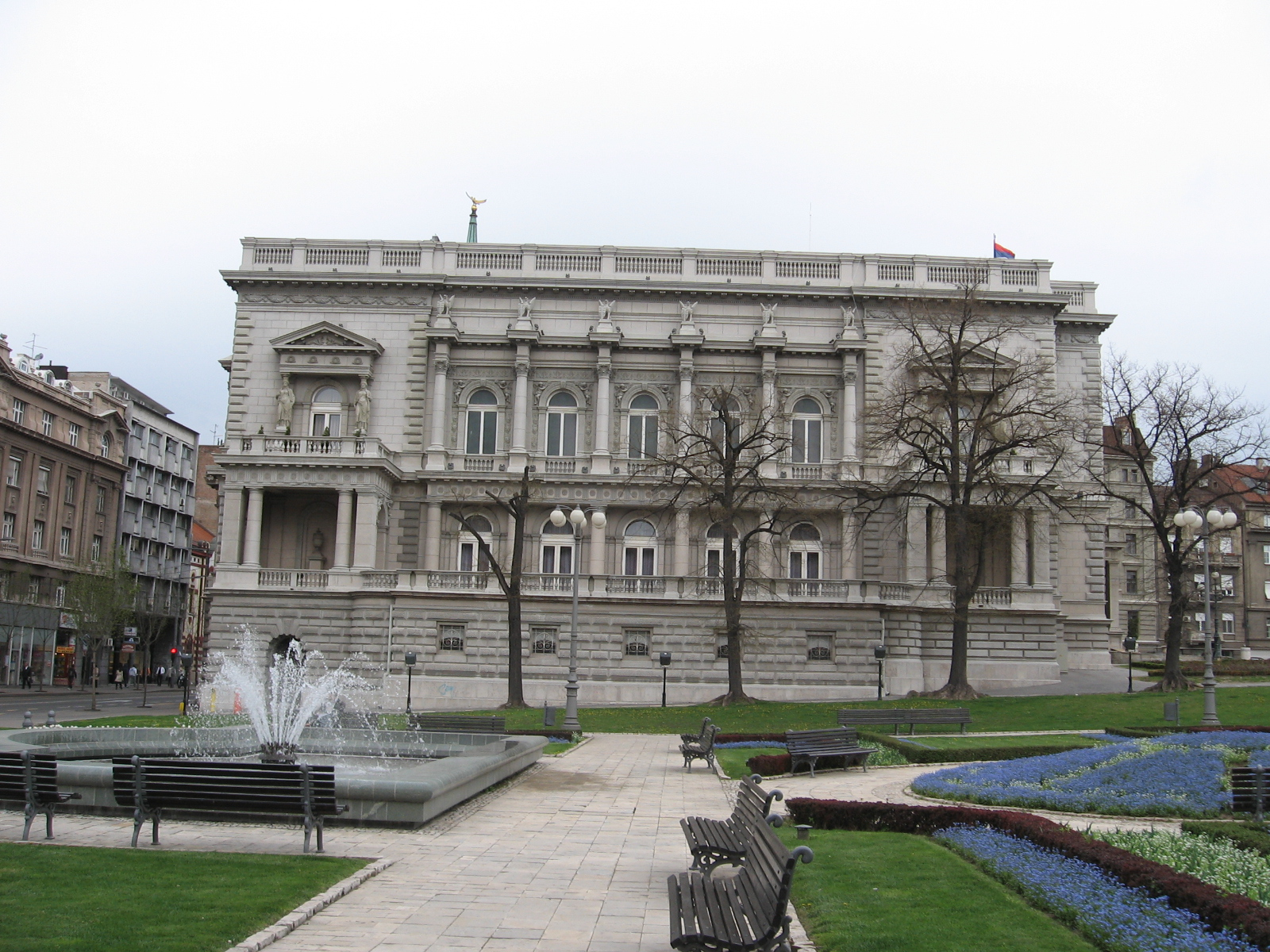 Stari Dvor, Beograd